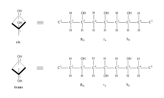 descritores pseudoassimetrico de C(1) e C(3)